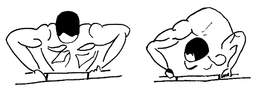 Shena raftan moves in Varzesh-e Pahlavani